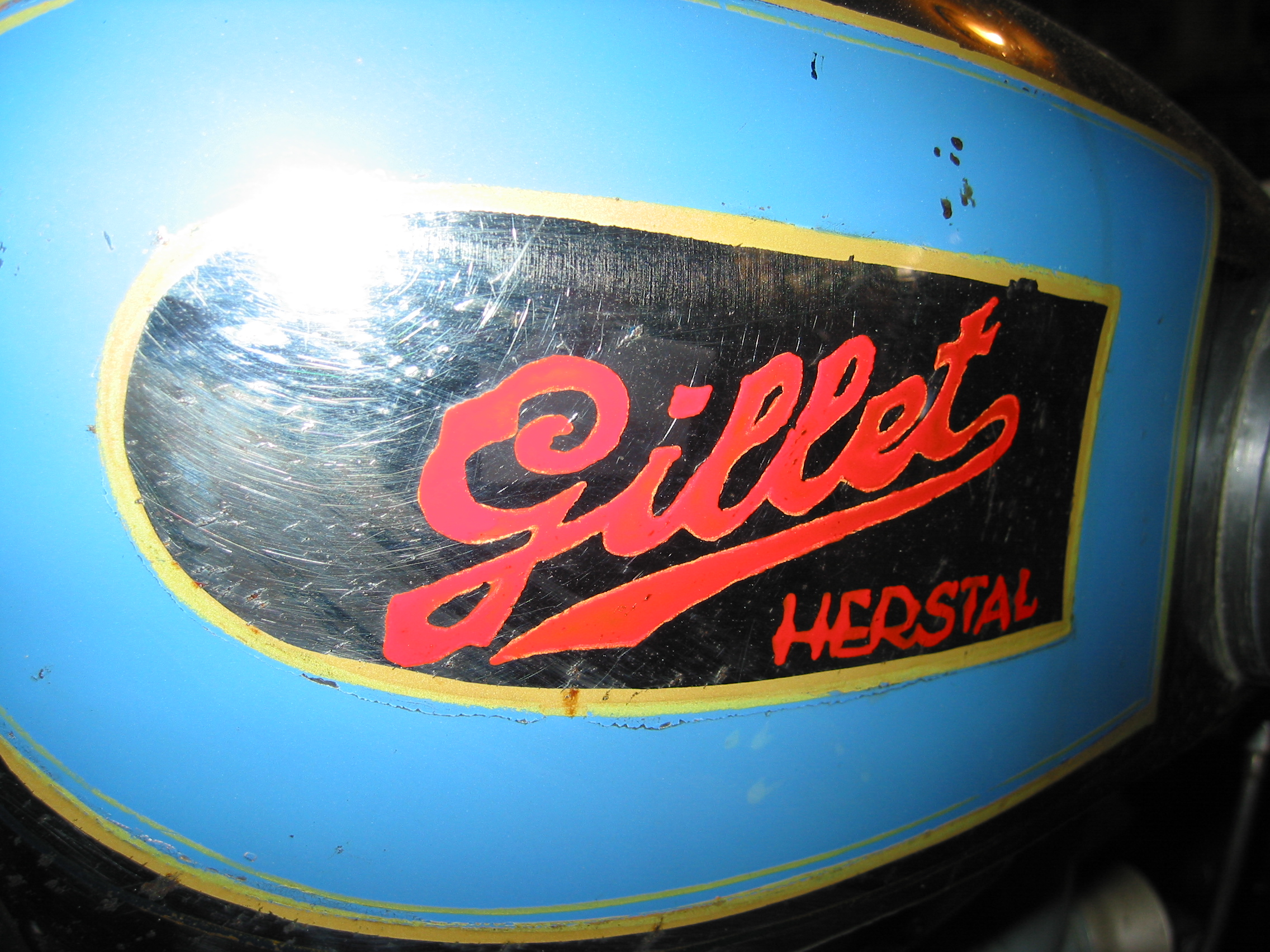 Emblem of Gillet-Herstal 1930